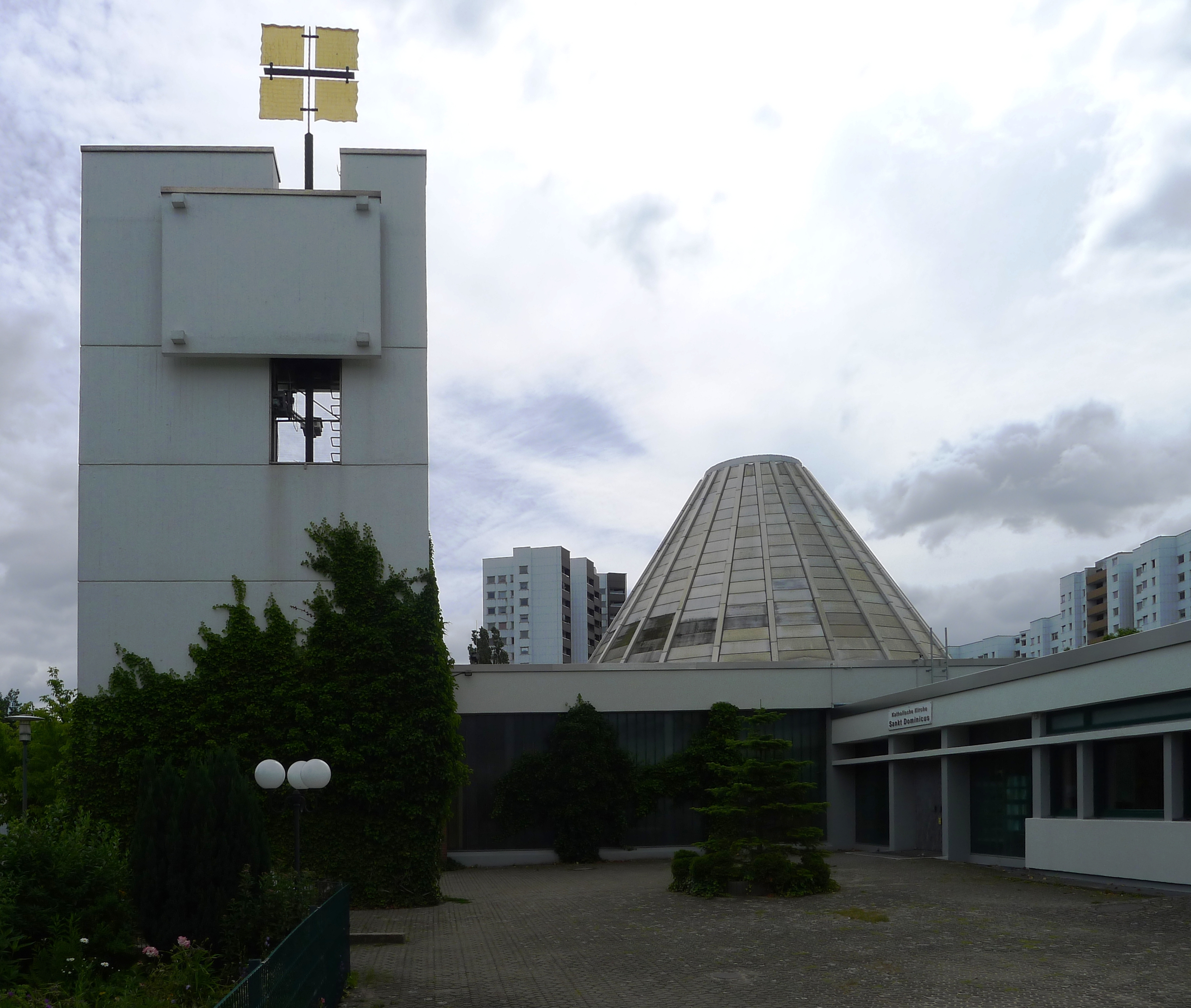 Campanile, Kirchenschiff und Anbauten für Gemeinderäume